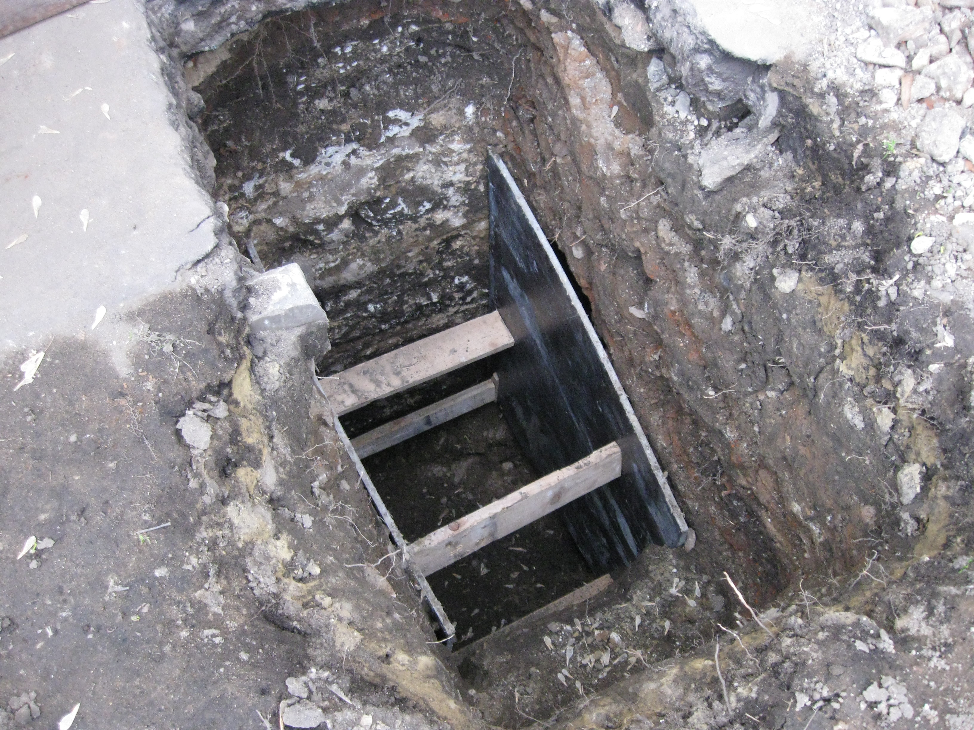 Стенки инженерно-геологического шурфа, пройдённого для исследования фундаментов, закреплены балками и листами